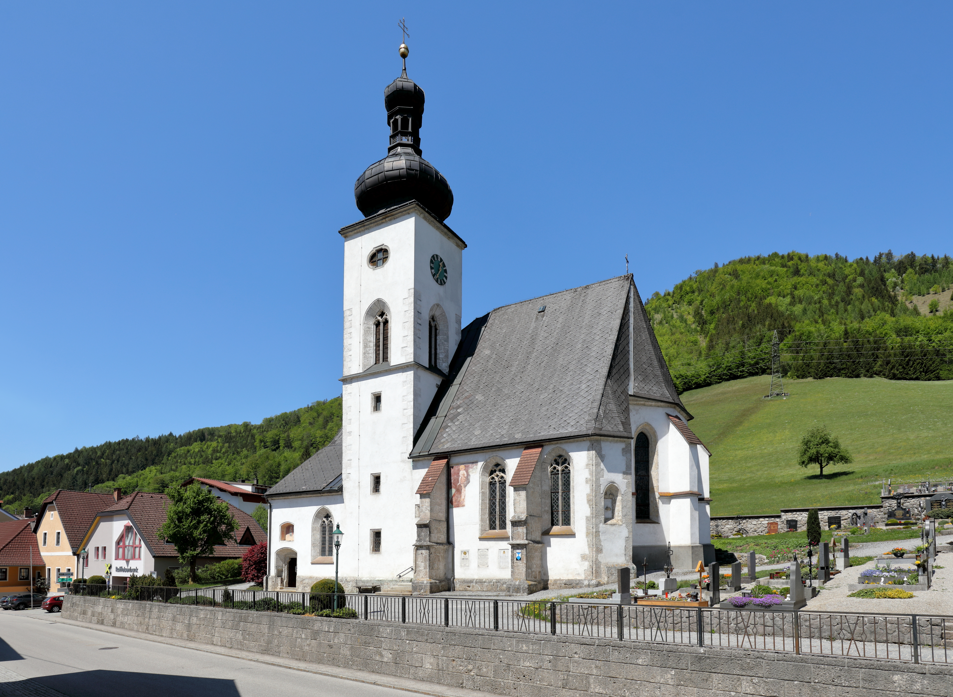 Ostsüdostansicht der röm.-kath. Pfarrkirche hl. Andreas in der oberösterreichischen Marktgemeinde Gaflenz.